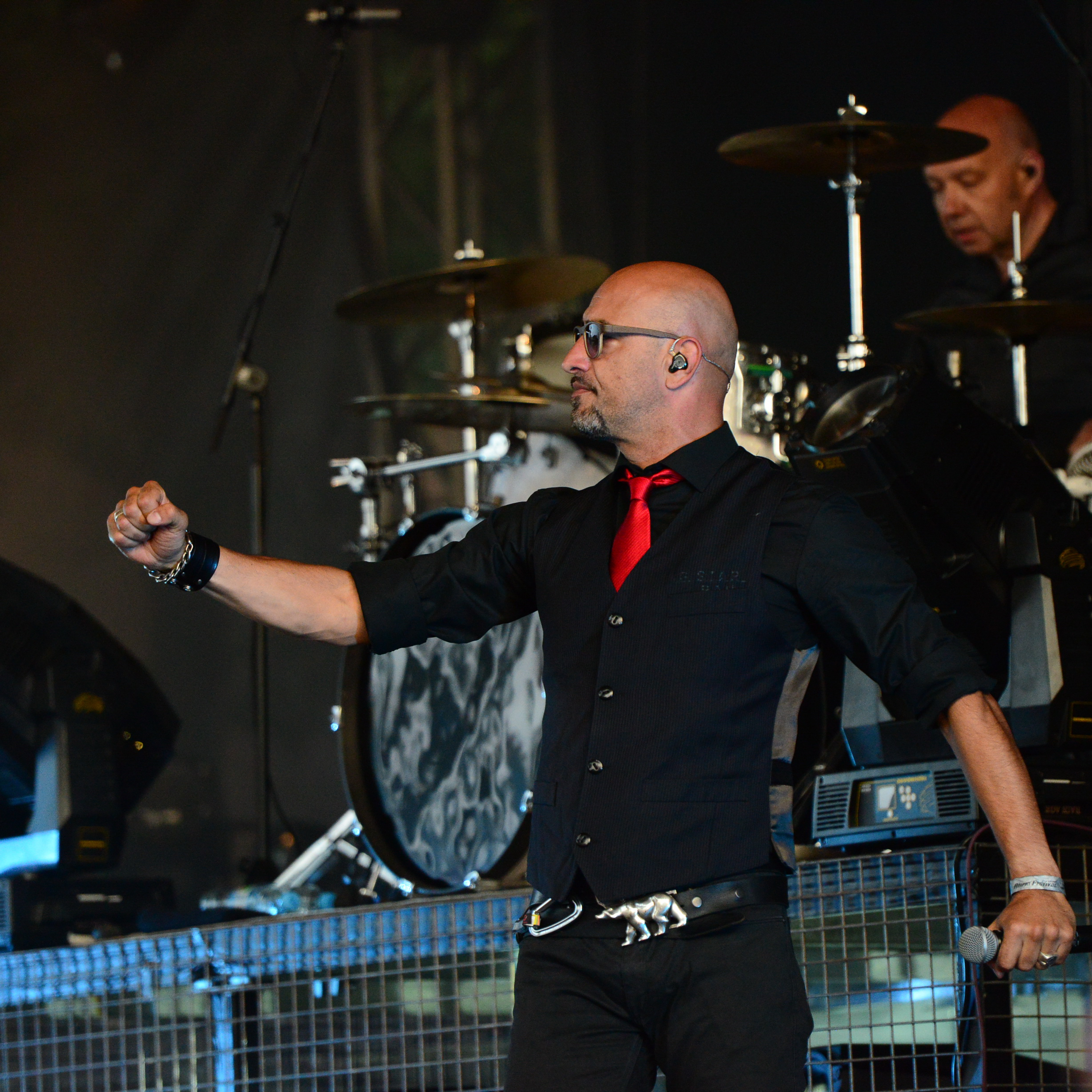 Eisbrecher, Amphi festival 2014